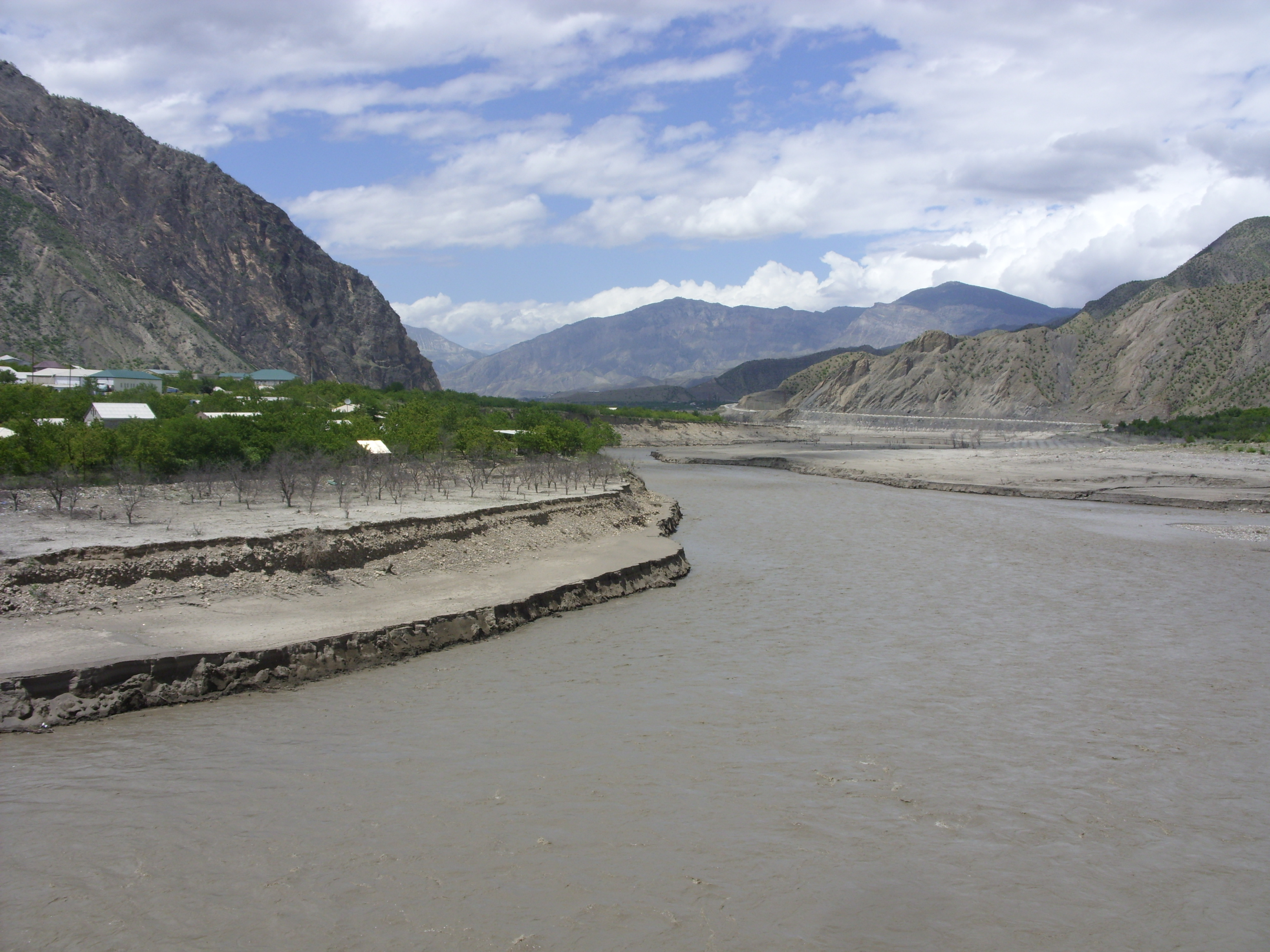 Ирганайское водохранилище после сработки уровня